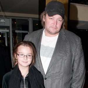 Александр Стриженов с дочкой на премьере фильма “Тёмный мир 3D”